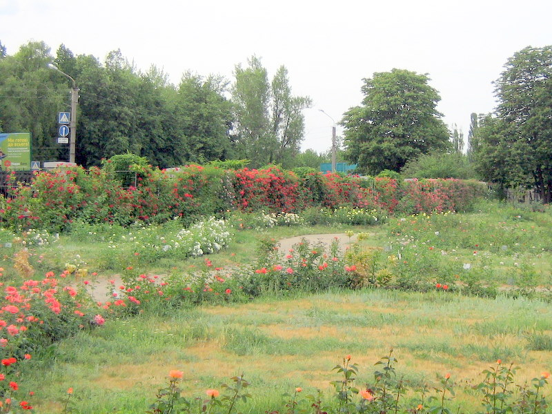 Розарий.